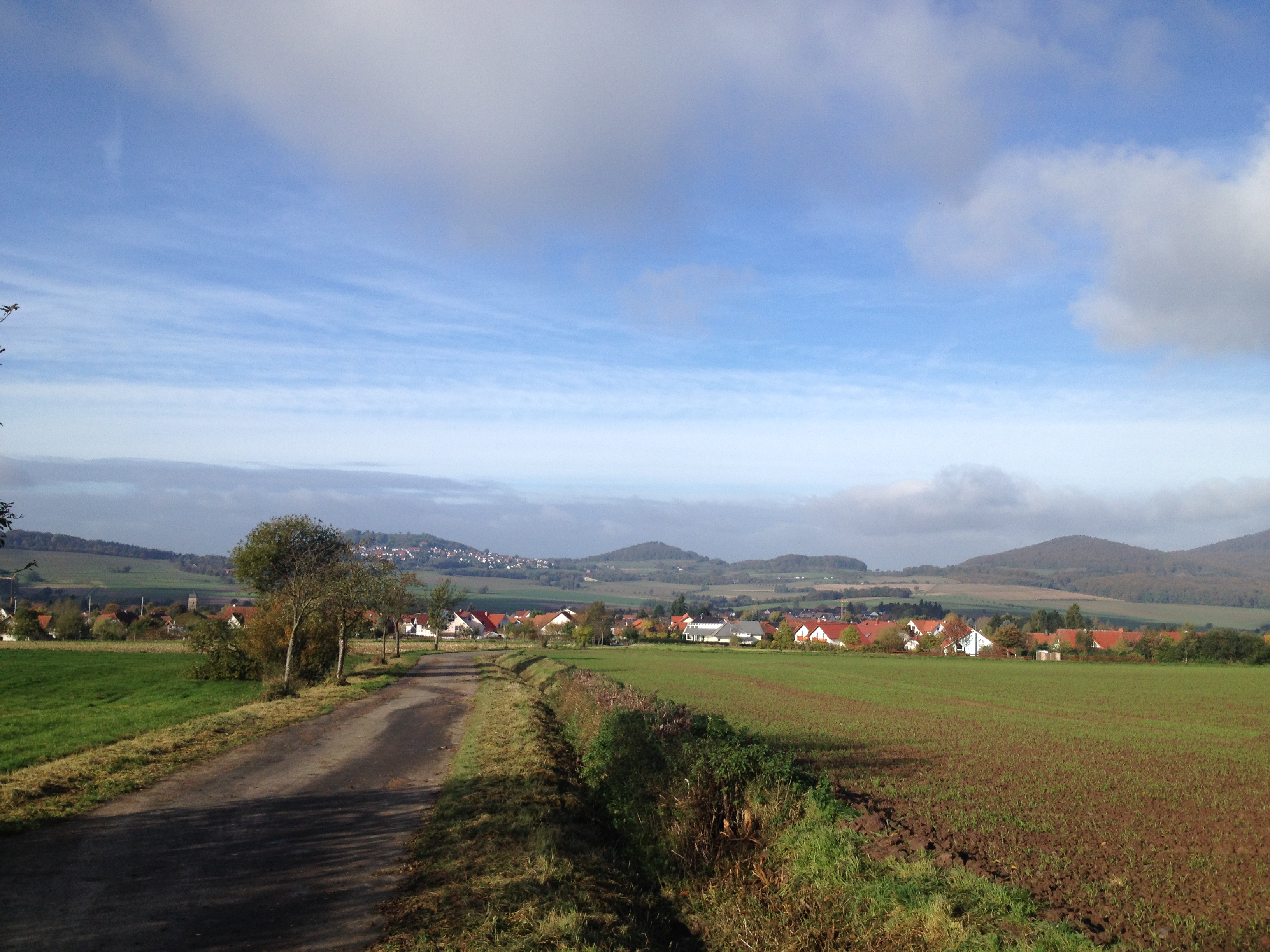 Blick von der Kohlenstraße östlich von Ehlen, über welche der Eco Pfad Kulturgeschichte Habichtswald und die lokalen Wanderwege ⊥ und E1 verlaufen, über Ehlen Richtung Burghasungen mit Hasunger Berg (links über Ort), Bosenberg (mitte) und Rohrberg (rechts)